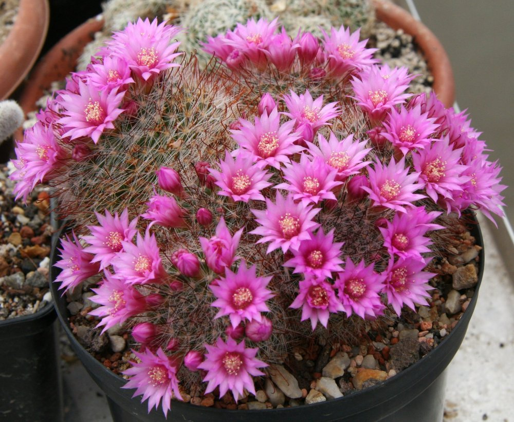 Mammillaria zeilmanniana in Blüte